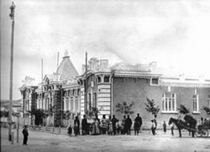 Здание казачества в городе Святой Крест (Будённовск)